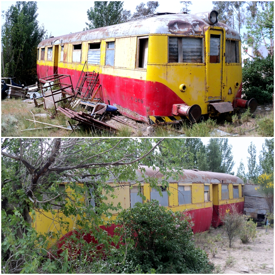 Coche motor Drewry usado como casilla vista de los dos lados